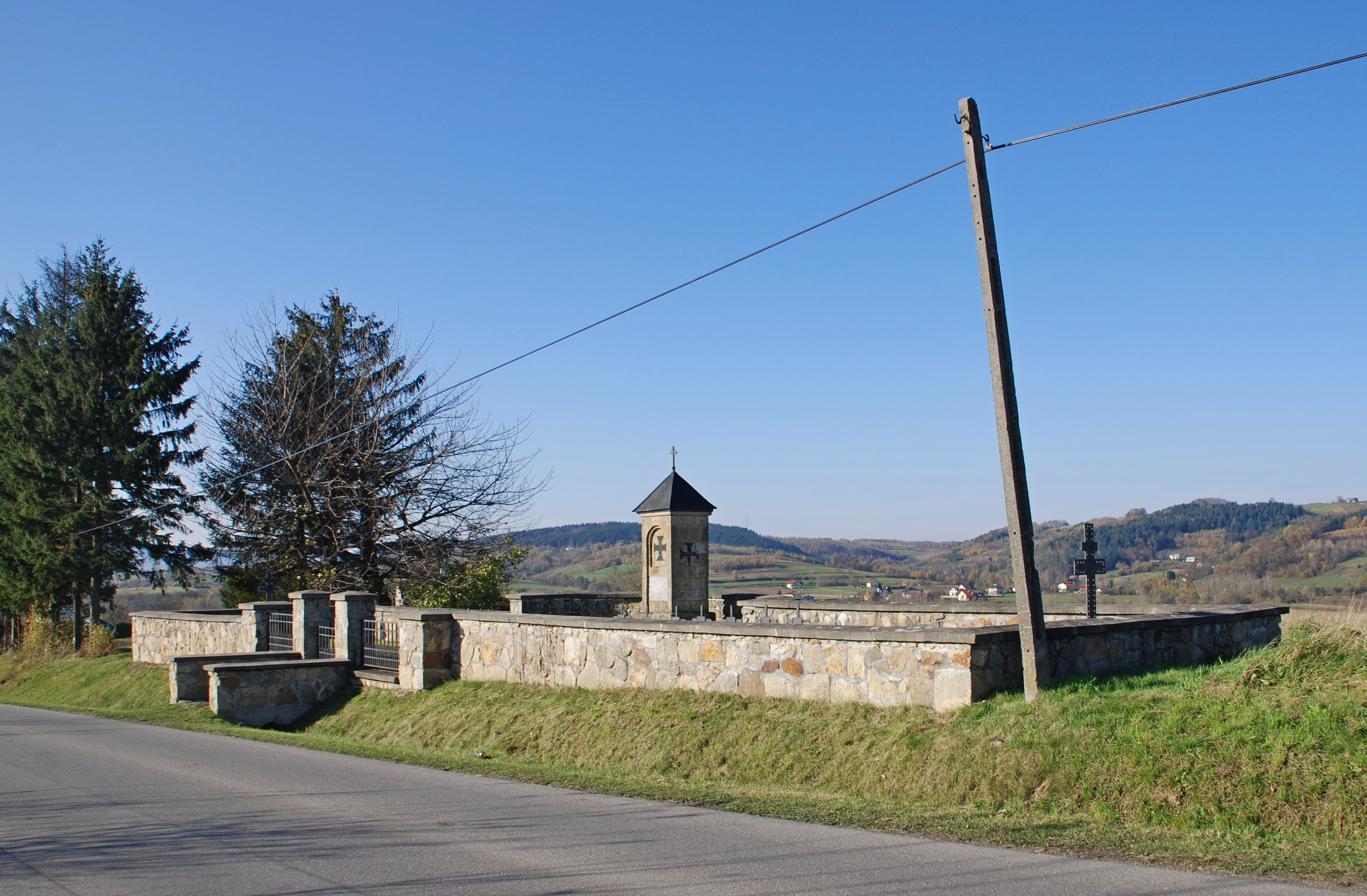 wieś Bieździadka